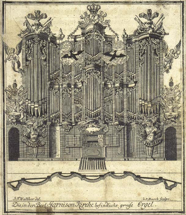 Die in der Garnisonkirche (Berlin) befindliche grosse Orgel; Kupferstich; 17.1 x 14.6 cm; aus: Die gute Hand Gottes über Die Garnison-Kirch- und Schul-Anstallten, in der Königlichen Preußischen Residentz Berlin, 1737, S. 88/89